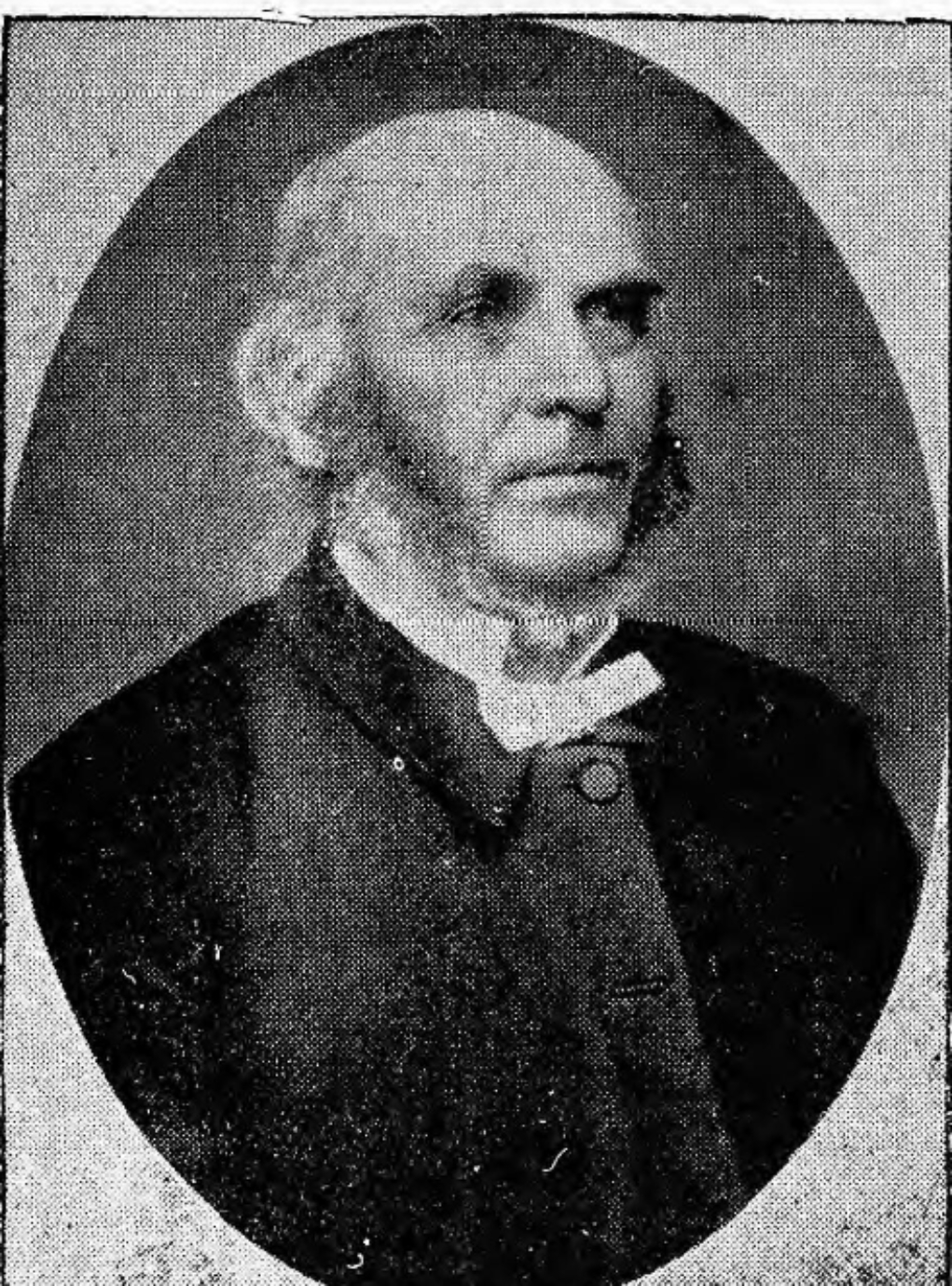 Josiah Jones (1830 -1915) gweinidog gyda'r Annibynwyr